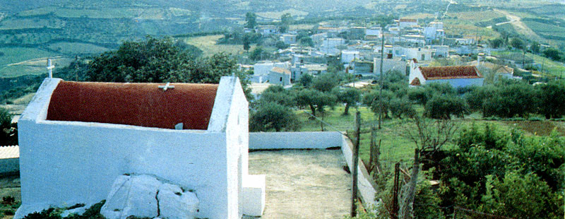 Vista panorámica de Galipe.